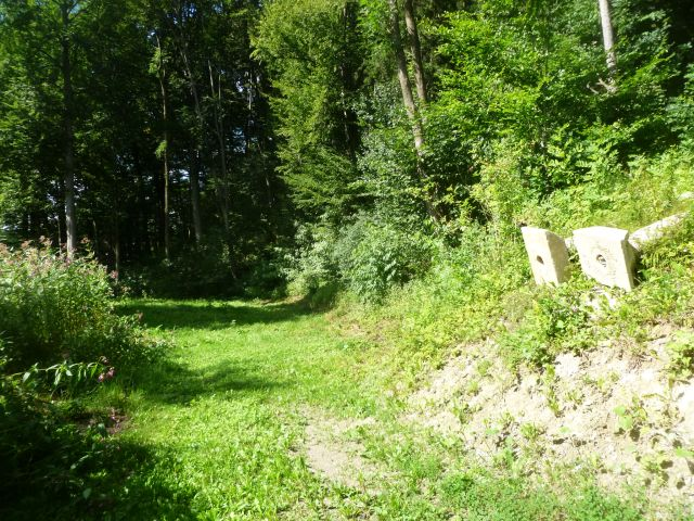 Ort_im_Innkreis_-__Burgplatz